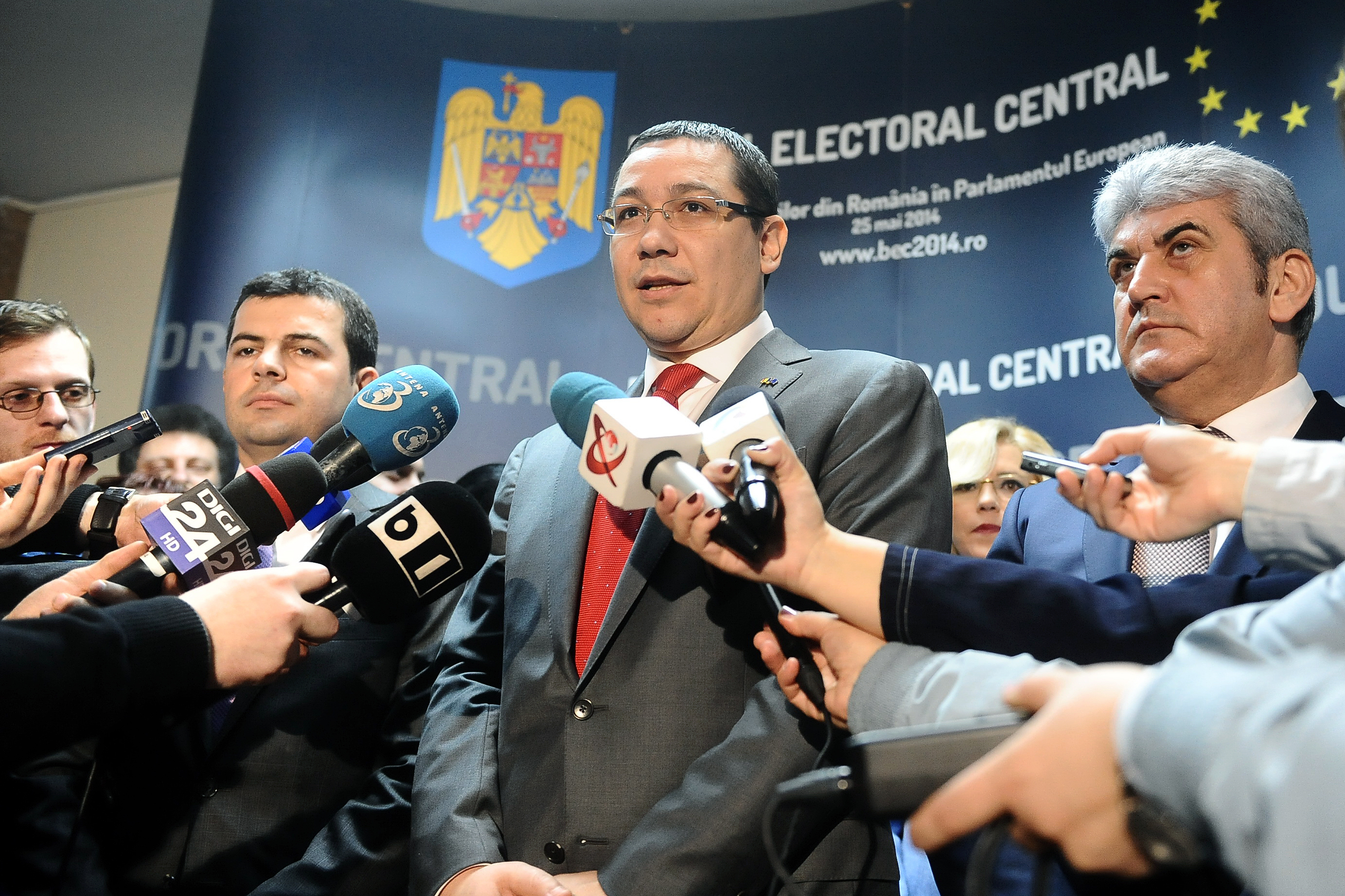 2. Victor Ponta la depunerea listei Aliantei Electorale PSD-UNPR-PC la alegerile europarlamentare - 22.03.2014